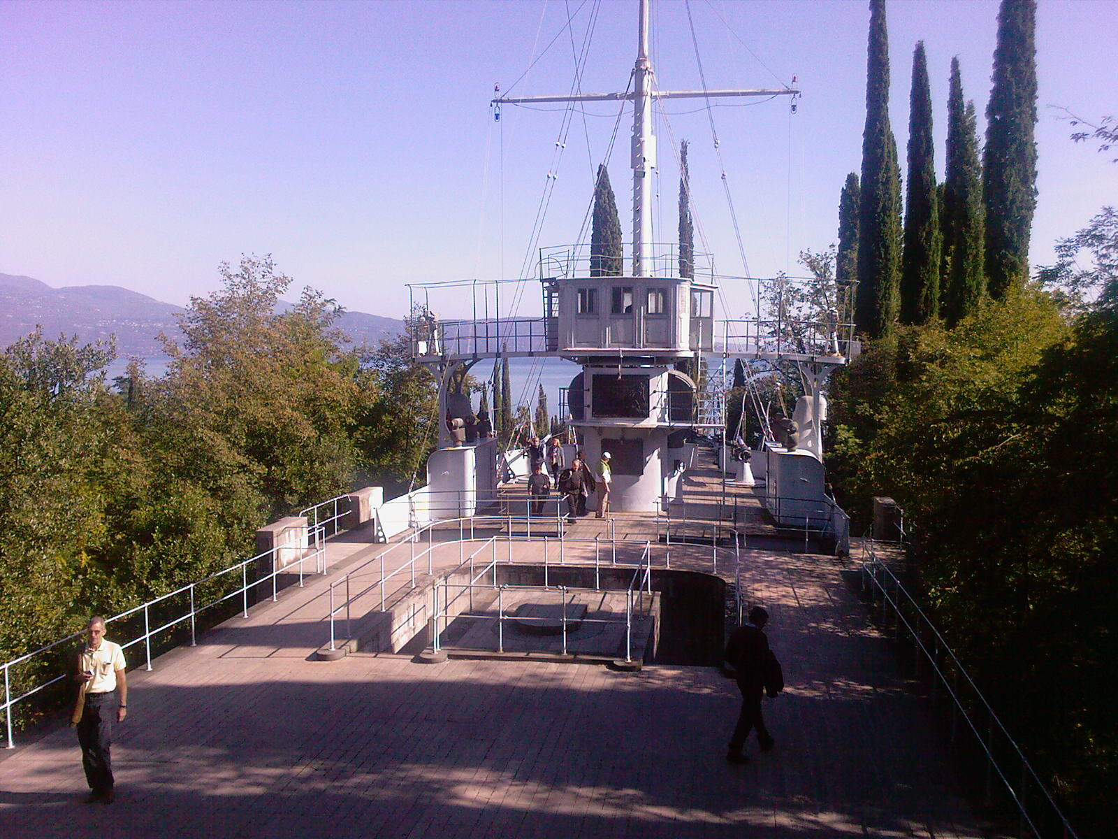 foto mia